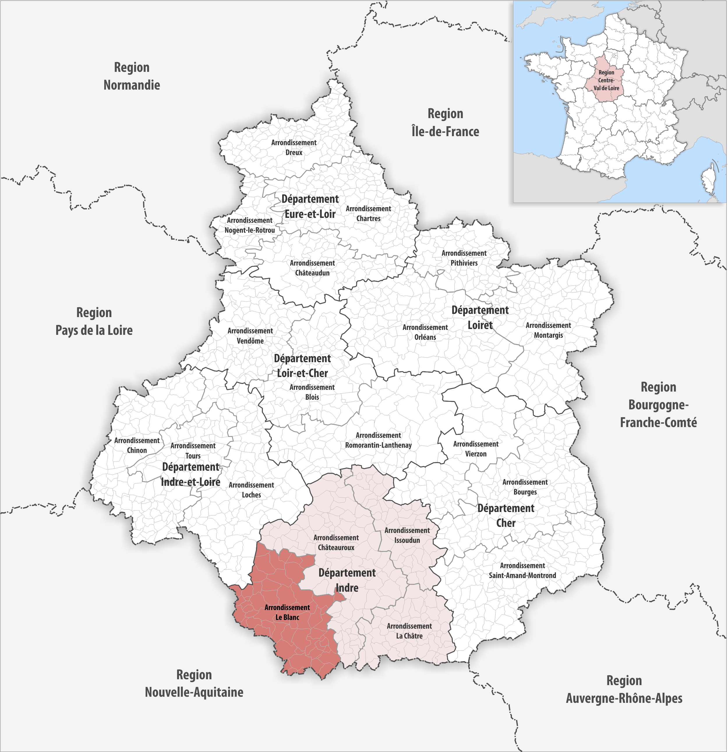 Lage des Arrondissements Le Blanc